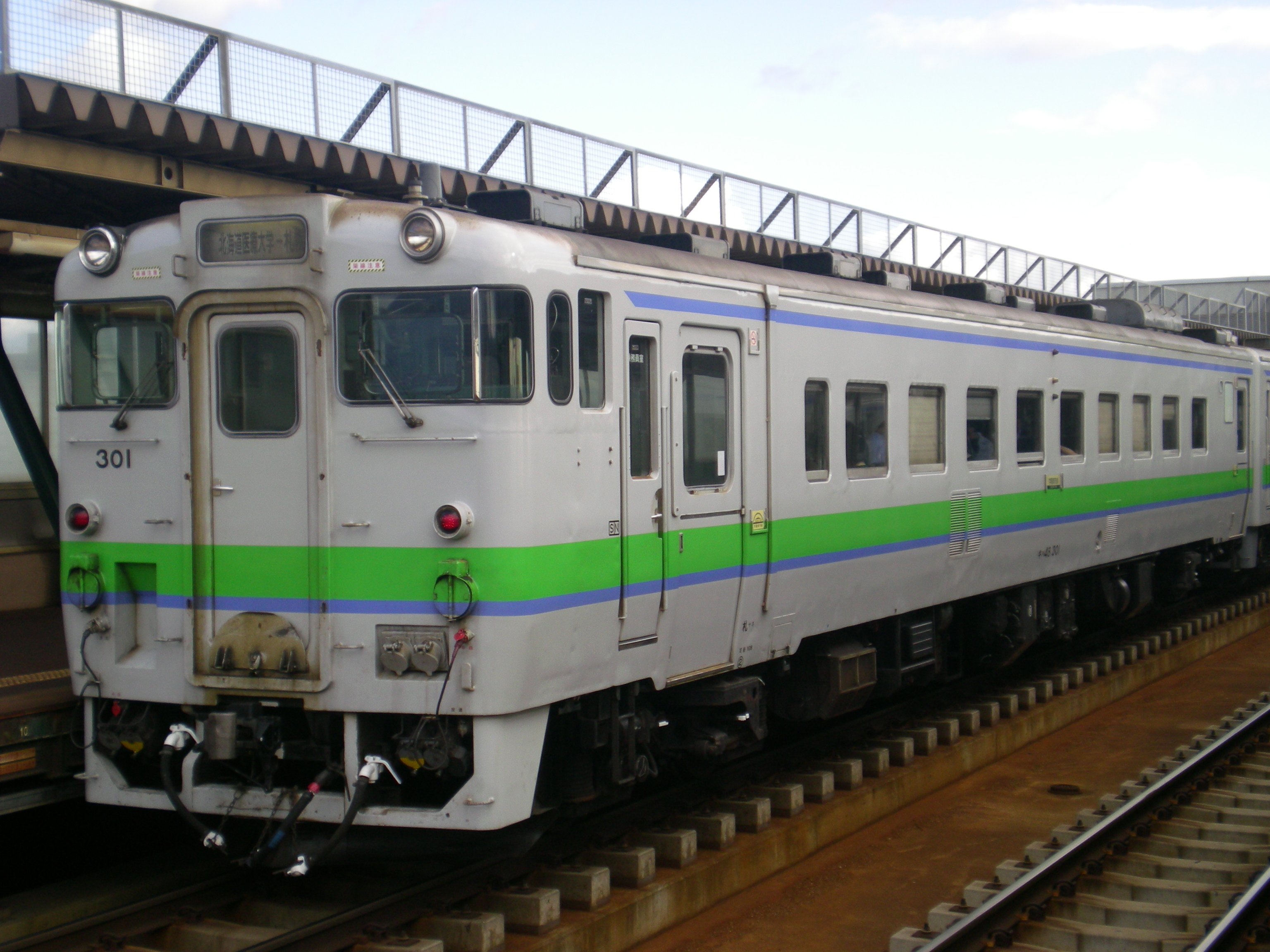 新川駅にて撮影、キハ48-301